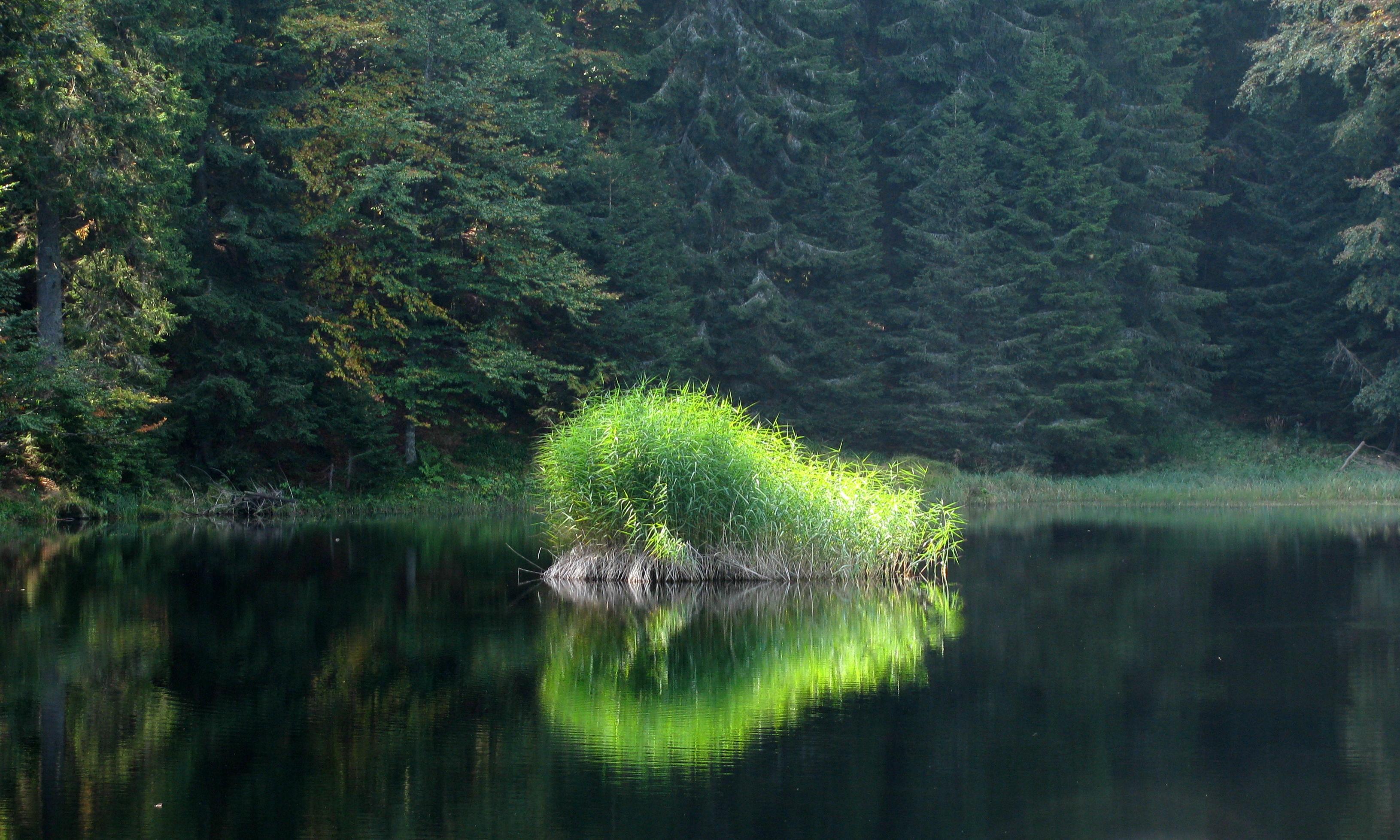 Jezerska jama